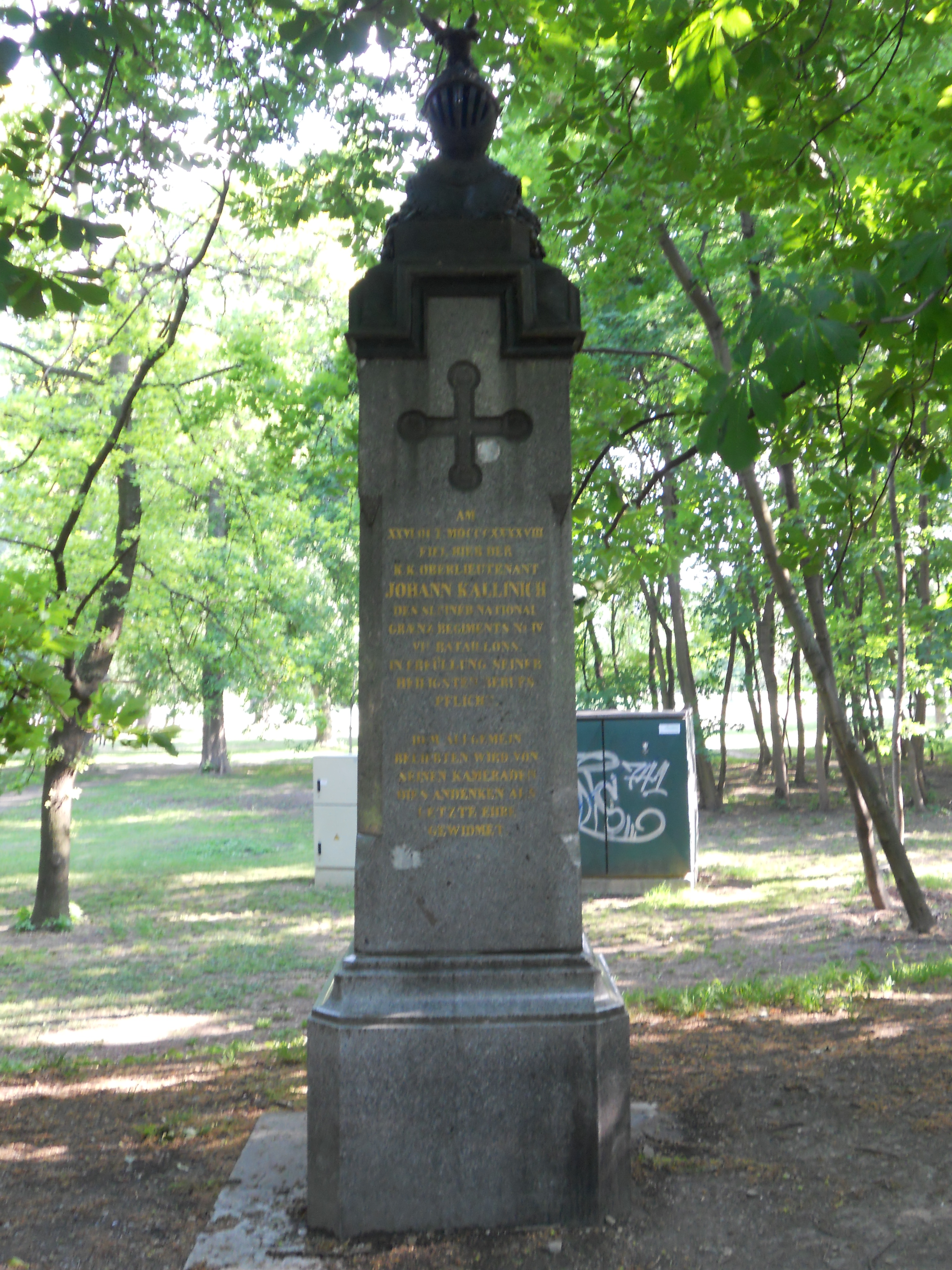 Denkmal für den im Zuge des Oktoberaufstandes 1848 getöteten Oberleutnant der kroatischen Grenztruppen Johann Kallinich im Wiener Prater.